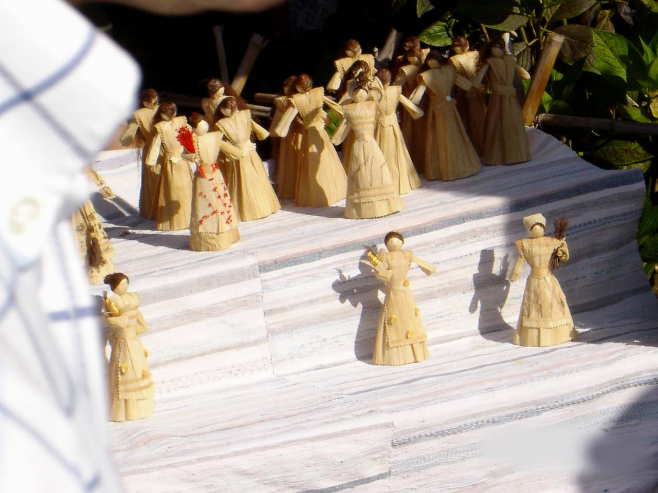 Bonecas de artesanato feitas com filha de milho obtida ao desfolhar a maçaroca, Ilha Terceira, Açores, Portugal.